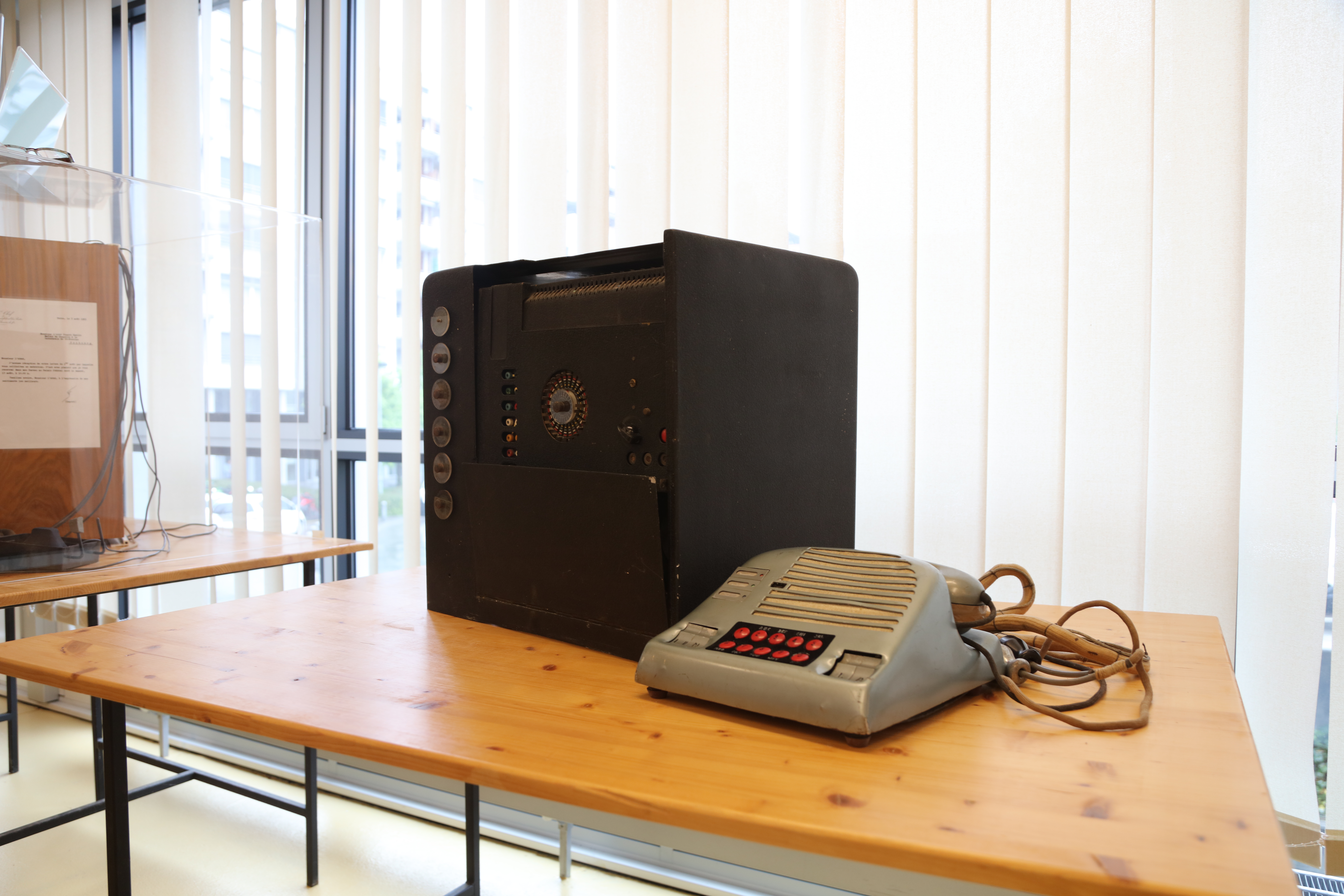 Das Tèkaphon von 1950. Konstruiert von Pierre Kaelin.Aufbewahrt in der BCUF Aussenstelle Beauregard